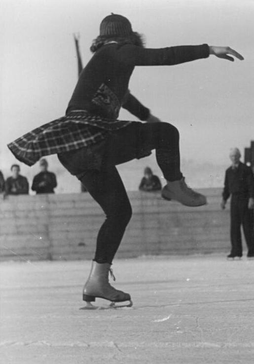 Margot Bragulla Aufn.: Illus Barberino 5226-50 31 Nb. Wintersport im Erzgebirge. In der Zeit vom 19.-22. Januar 1950 fanden in Altenberg-Geising (Osterzgebirge) die sächsischen Wintersportmeisterschaften statt. UBz- Margot Bragulla, (BSG Erich Zeigner - Leipzig.) bei einer Pirouette.